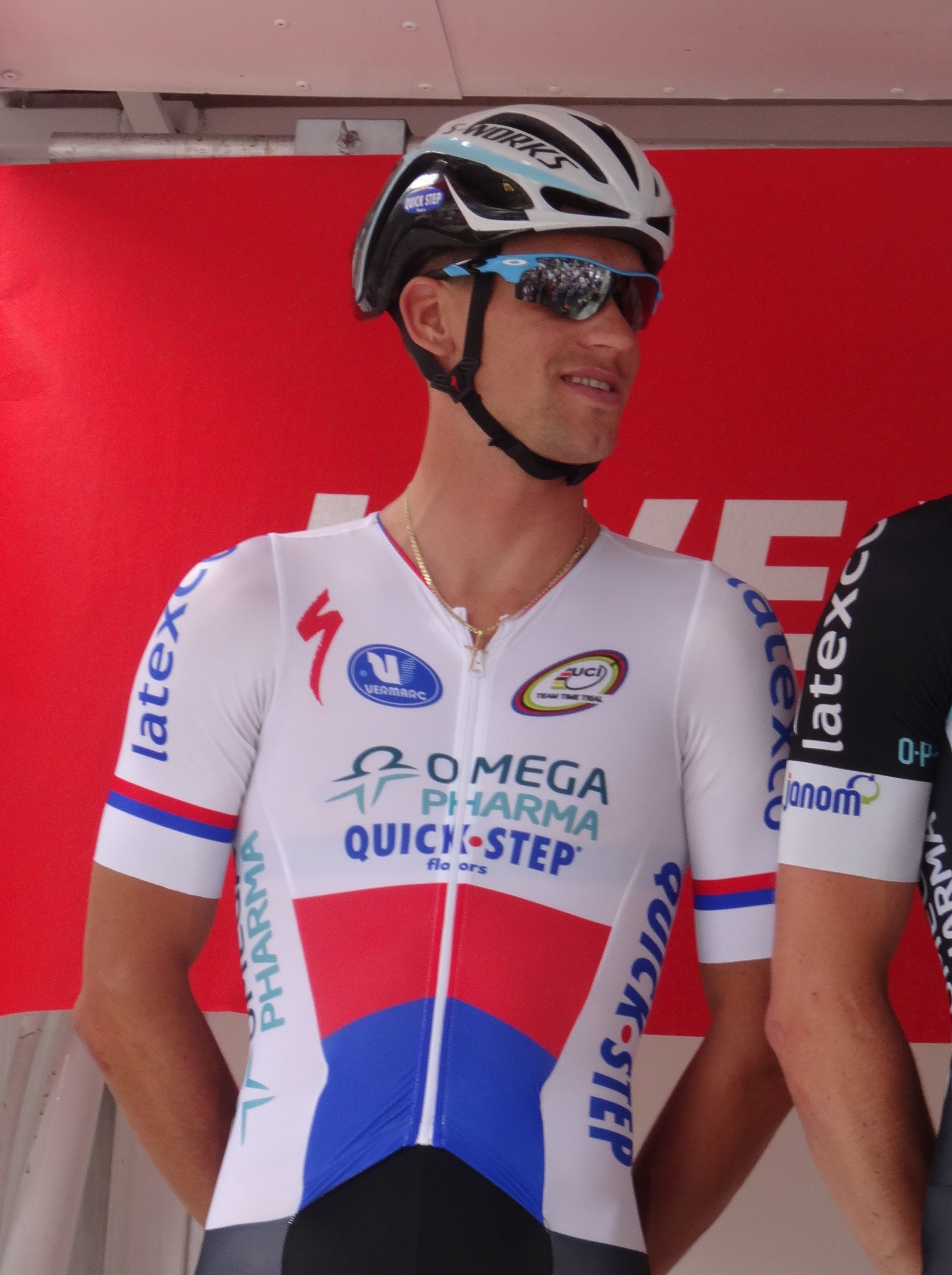 Reportage photographique réalisé le samedi 26 juillet à l'occasion du départ de la première étape du Tour de Wallonie 2014 à Frasnes-lez-Anvaing, Belgique.